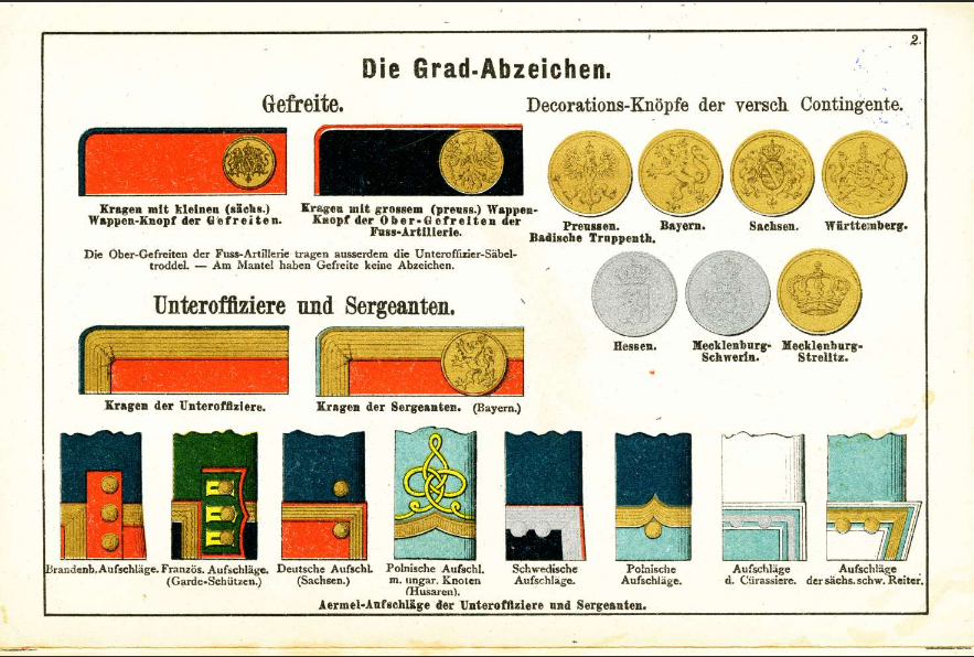 Uniformen der Deutschen Armee. Zweite Abtheilung-: Die Abzeichen der militär-ischieii Grade und die sonstigen Auszeichnungen an den Uniformen der Deutschen Armee .